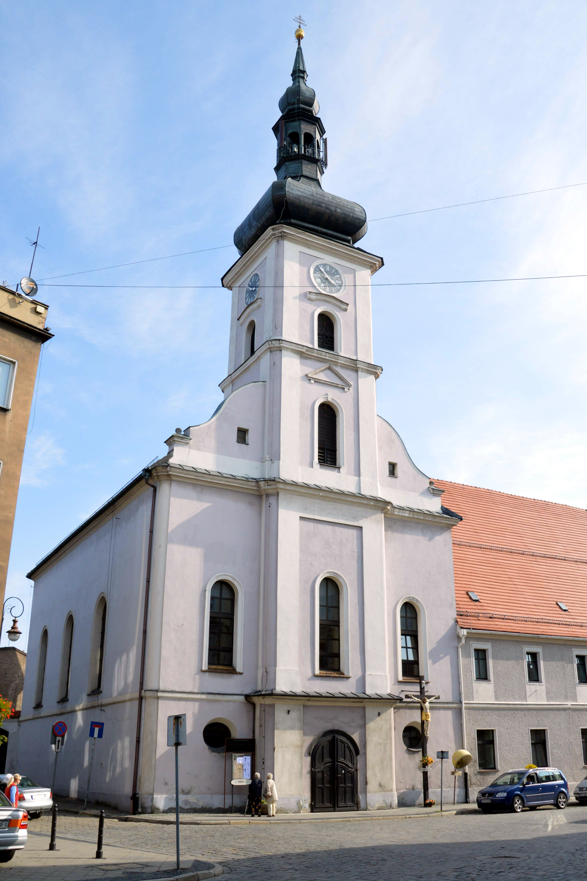 Prudnik, kościół, ob. par. pw. śś. Piotra i Pawła, 1783-1787 10.1958.